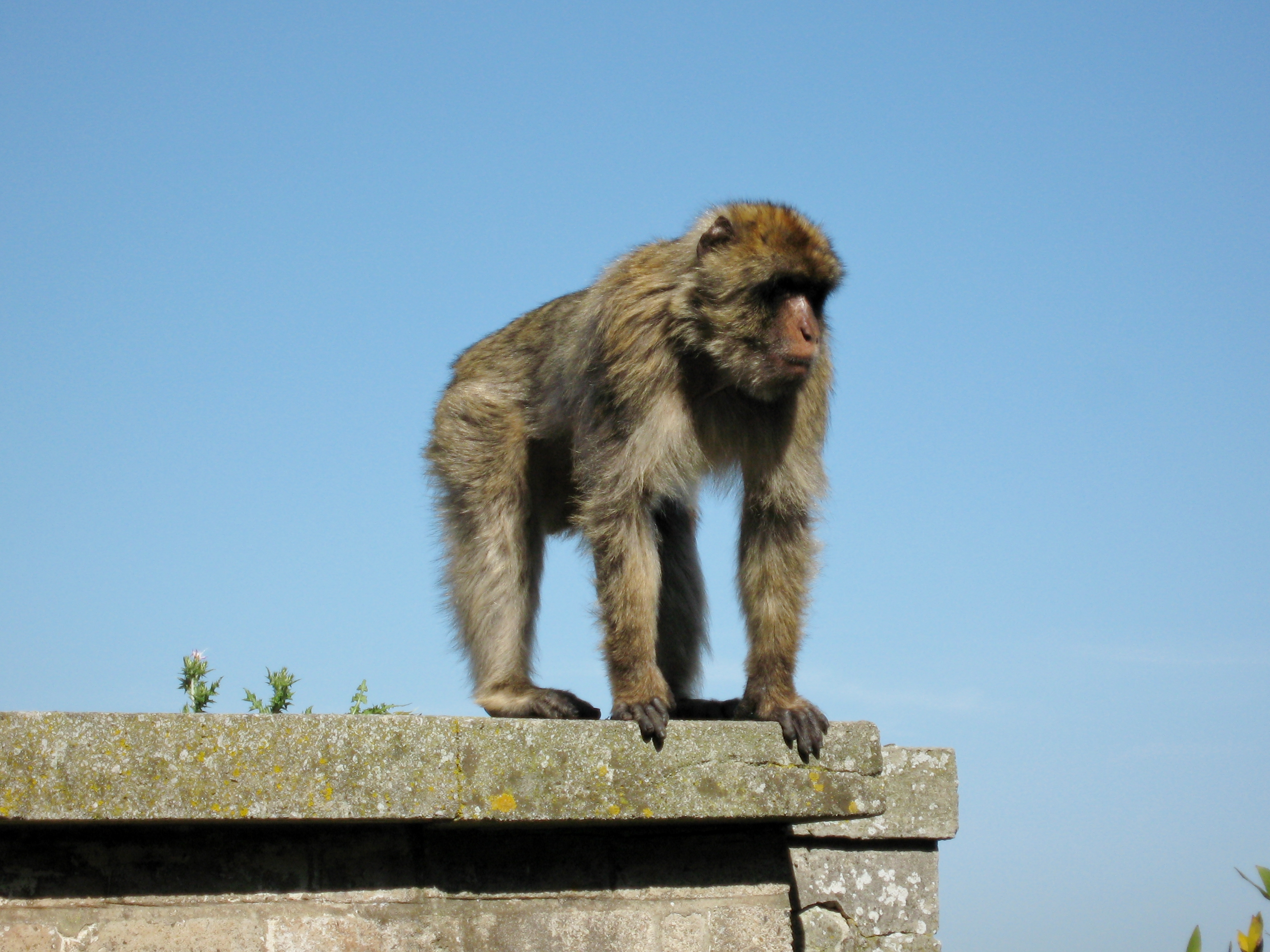 Macaca sylvanus, Gibraltar